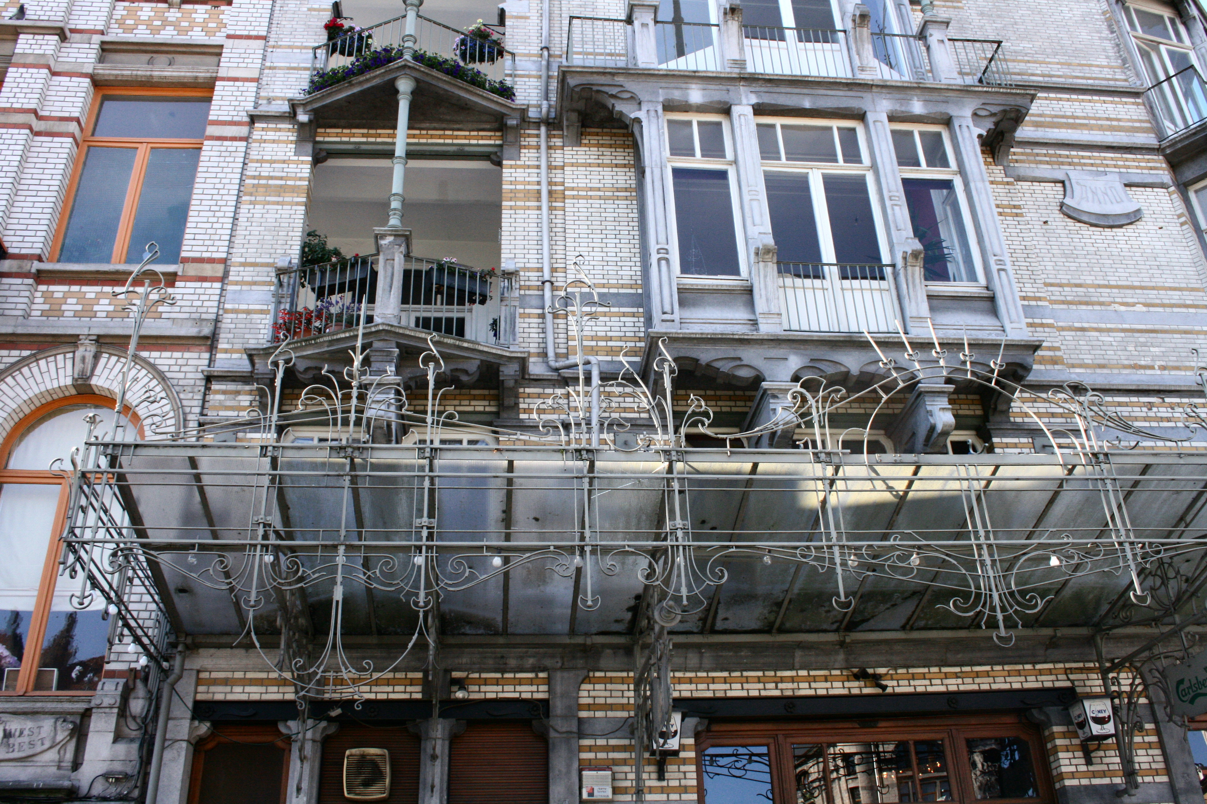 65, avenue Louis Bertrand, Schaerbeek (Brussels)